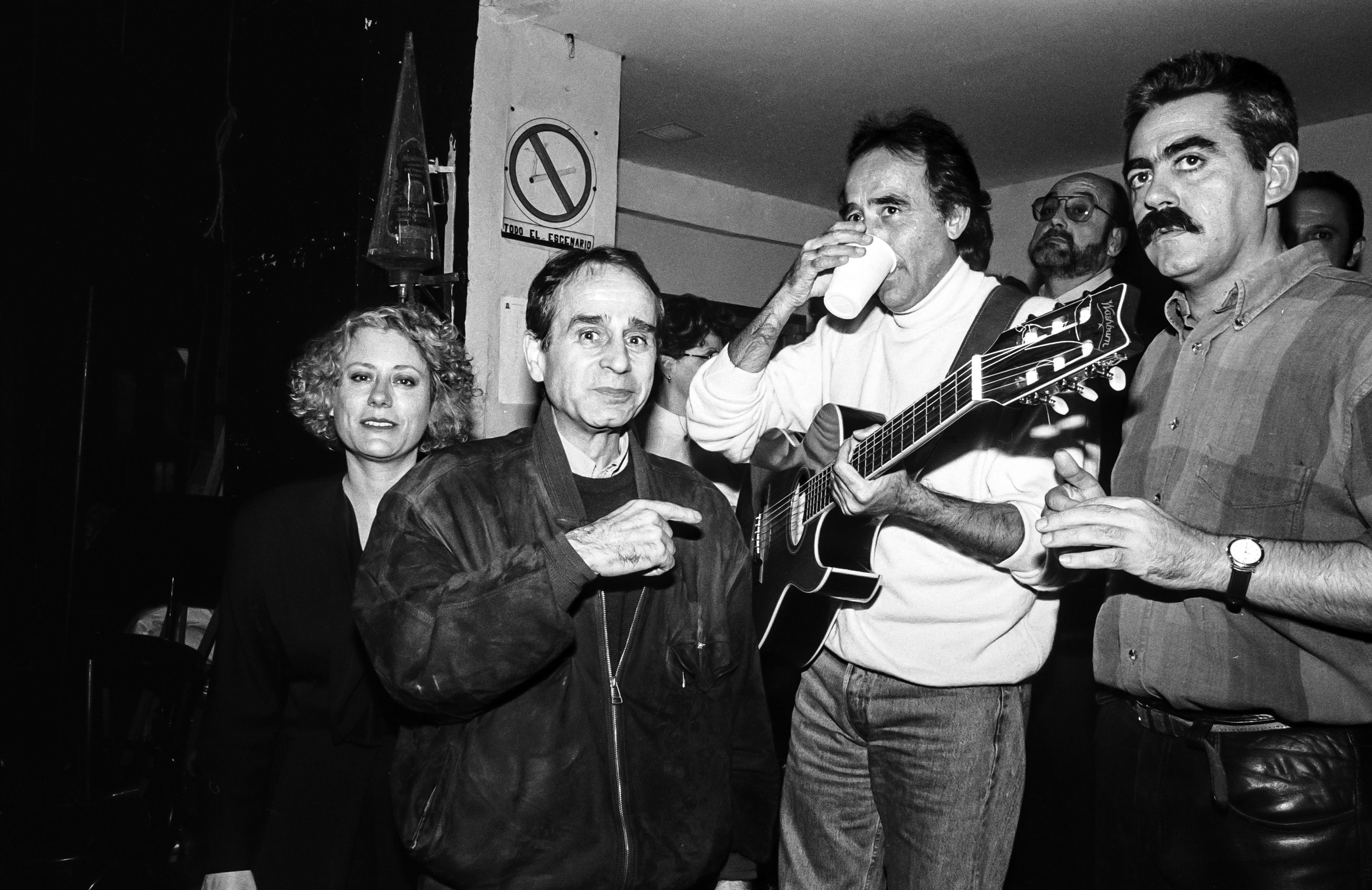 Homenaje a Ovidi Montllor "La cançò amb Ovidi". Teatre Calderon de Alcoi. 30 noviembre 1994